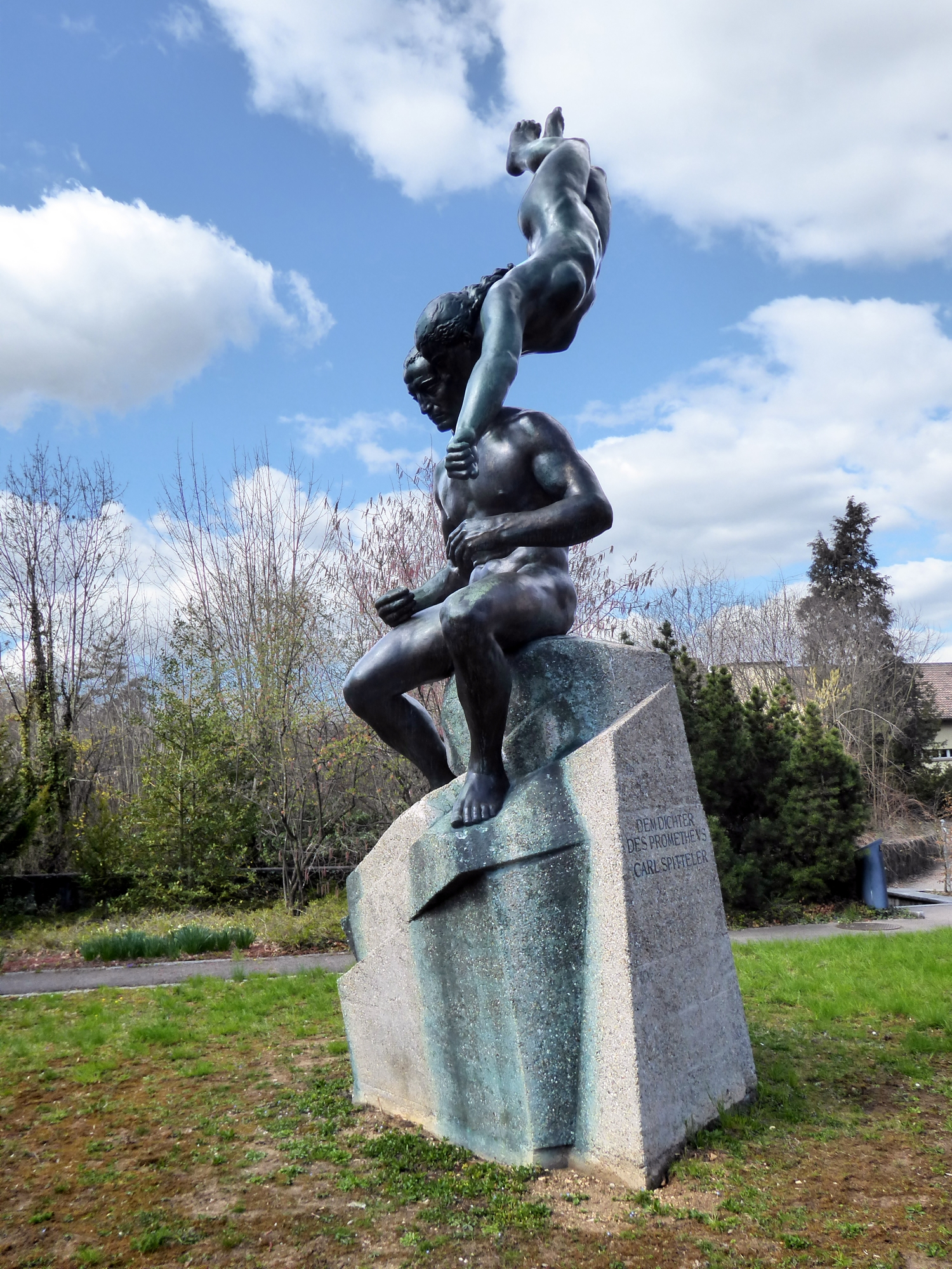 August Suter (1887-1965) Bildhauer. Seine berühmteste Skulptur ist das Denkmal -Prometheus und die Seele, (Dem Dichter des Prometheus) gewidmet Carl Spitteler (1845-1925) in Liestal, an dem er von 1926 bis 1931 arbeitete. Auch Mensch und Göttin "Seele" - oder der Dichter und die Eingebung - der Dichter und die Inspiration. Standort, 47°29'16.3N 7°43'47.8E